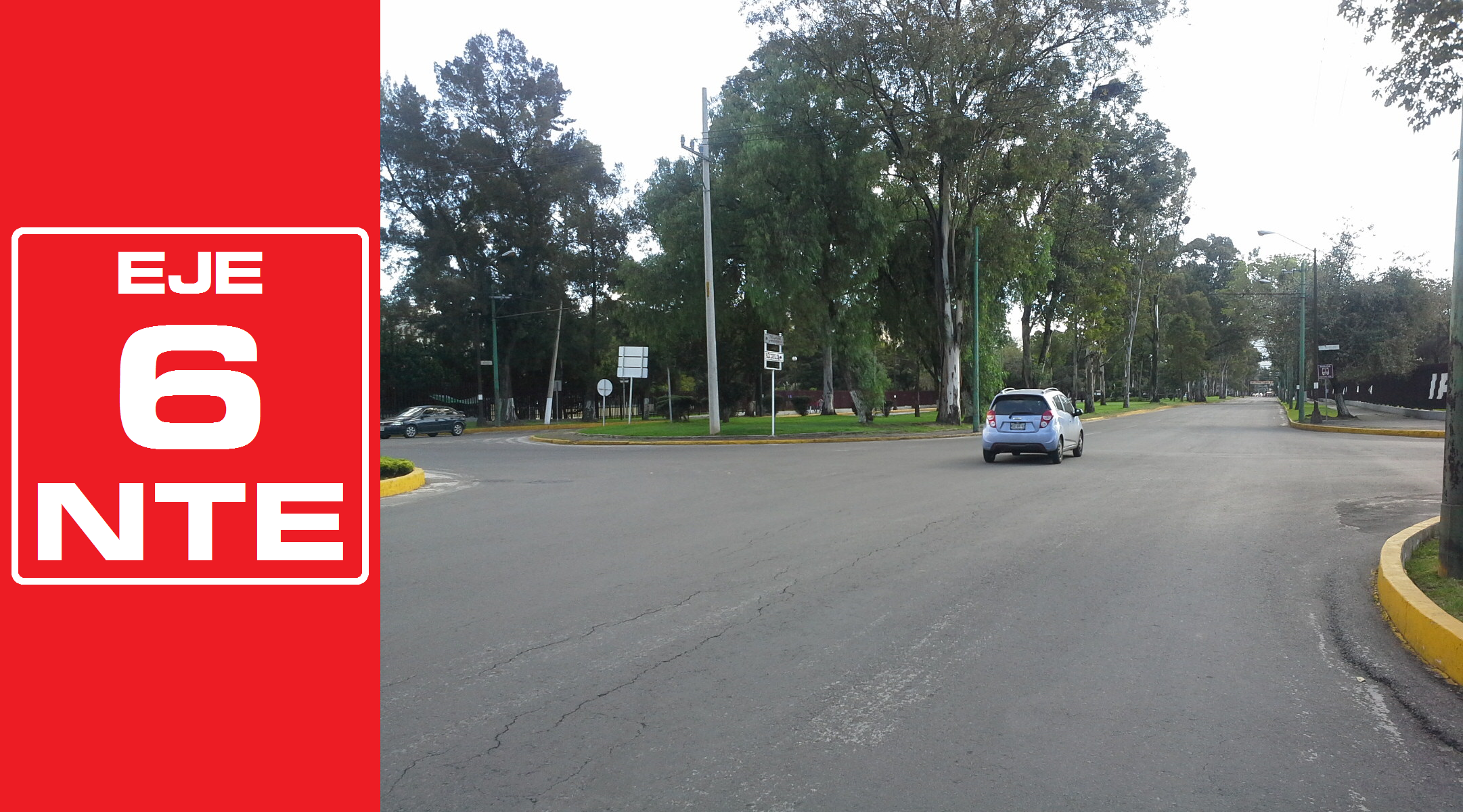 Rediseñado original de la señalética de los Ejes viales de la Ciudad de México por José García (Wiki ID: narumiyama)